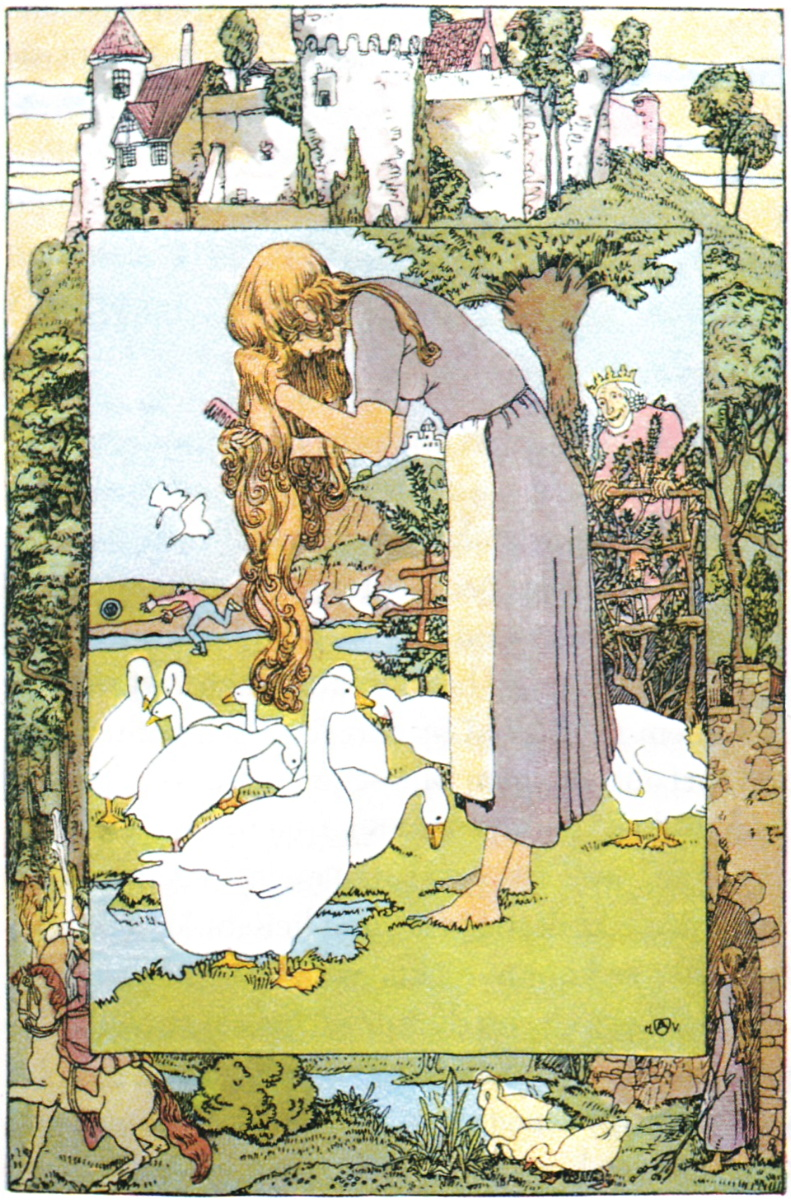 Illustration des Grimm'schen Märchens „Die Gänsemagd“ (KHM 89) von Heinrich Vogeler